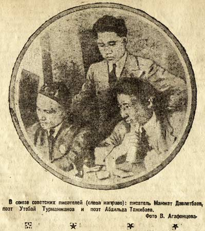 Фотография из газеты "Комсомольская правда" за 02.04.1936 г. Группа молодых казахских литераторов. Стоит в центре поэт Утебай Турманжанов